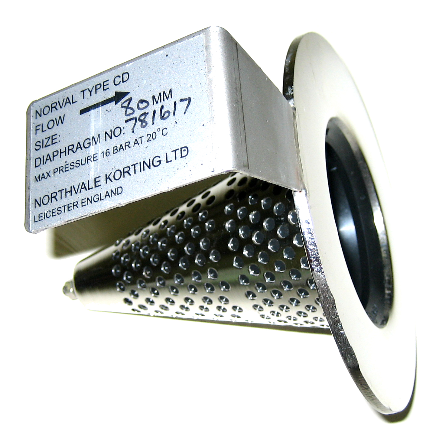 Photographie Personnelle d'un Clapet Anti-Retour (Plomberie) INOX